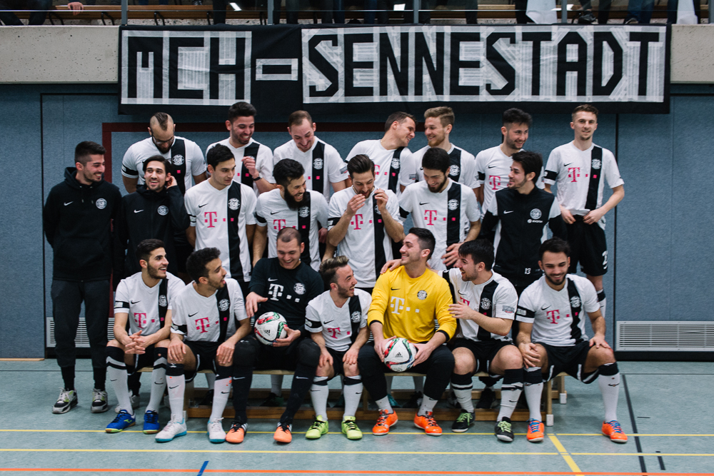 Spontanes Foto vom Team